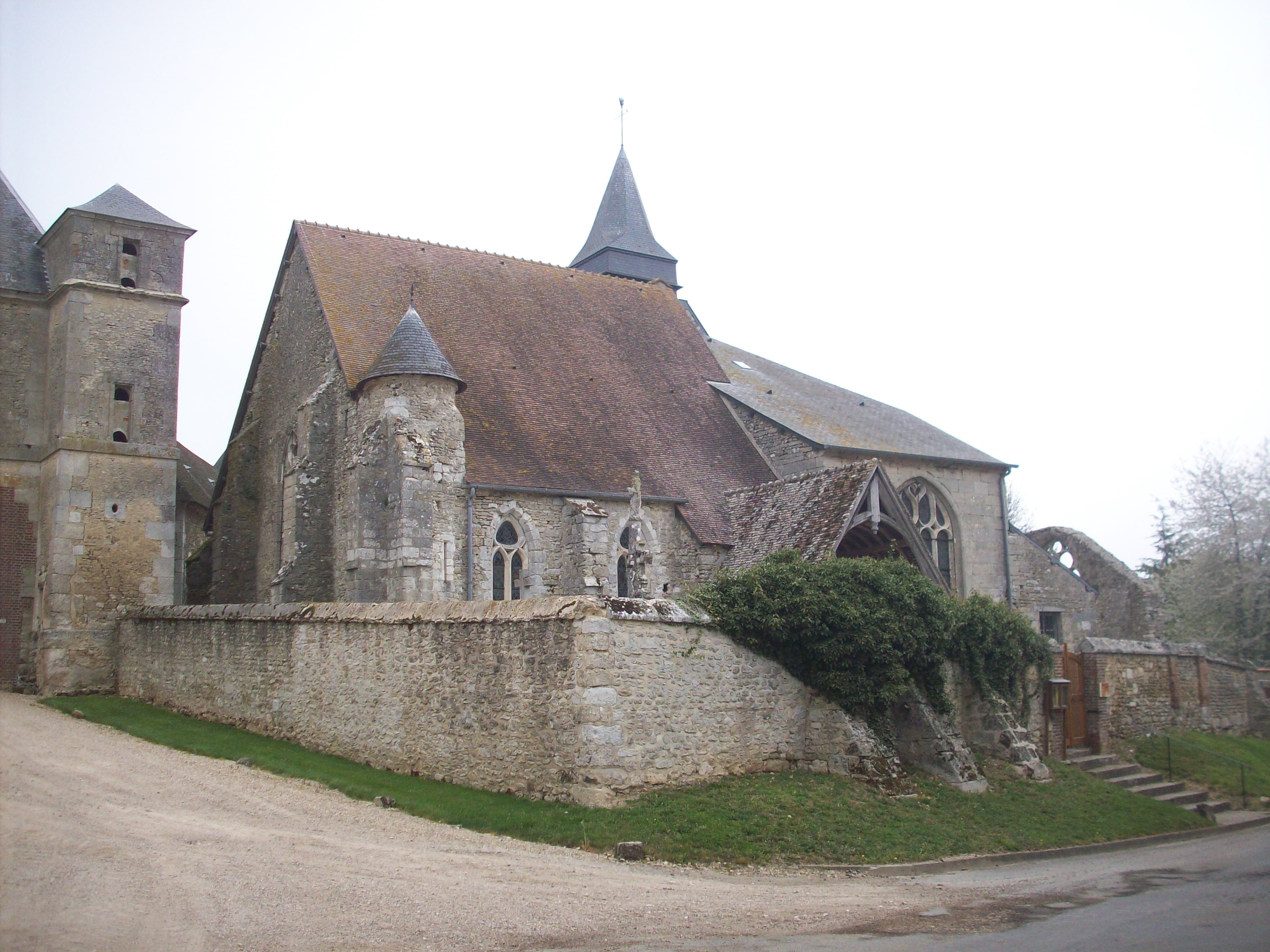 Église la Trinité-Saint-Sauveur de Fours.